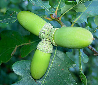 Eicheln, die Früchte der Eiche. Bei der Stieleiche sind die Eicheln an kleinen Stielen. Bei der Traubeneiche liegen die Eicheln direkt am Ast an. Fotograf: Walter J. Pilsak, Waldsassen Copyright Status: GNU Freie Dokumentationslizenz